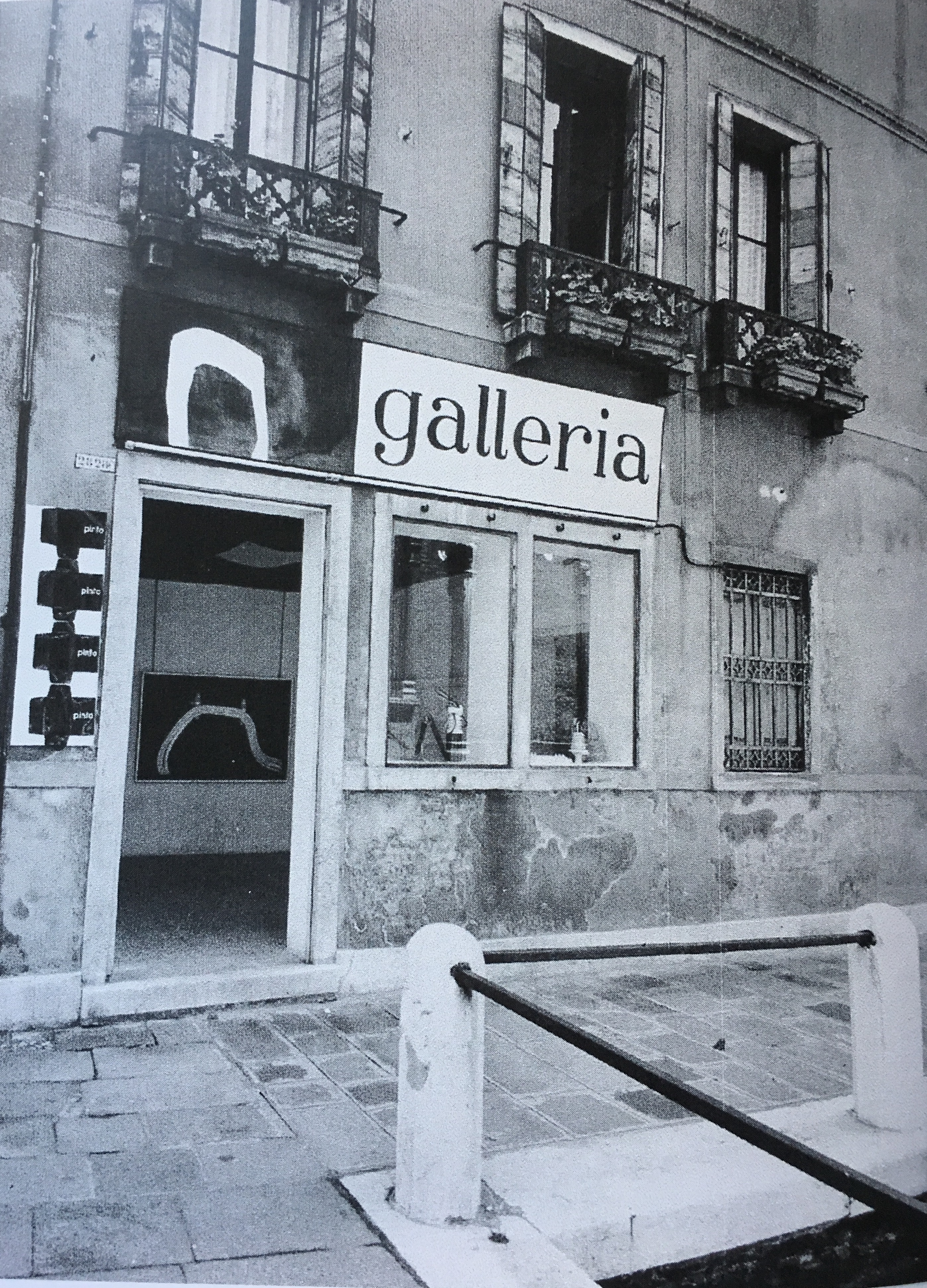 Galleria Numero di Fiamna Vigo. Venezia, Campo S. Stefano 1969